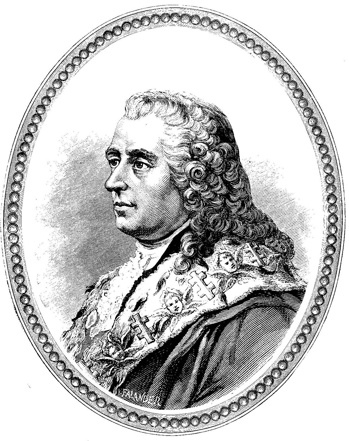 Carl Gustaf Tessin. Bild ur planschverket Femtio porträtt af ryktbara svenskar (sent 1800-tal)